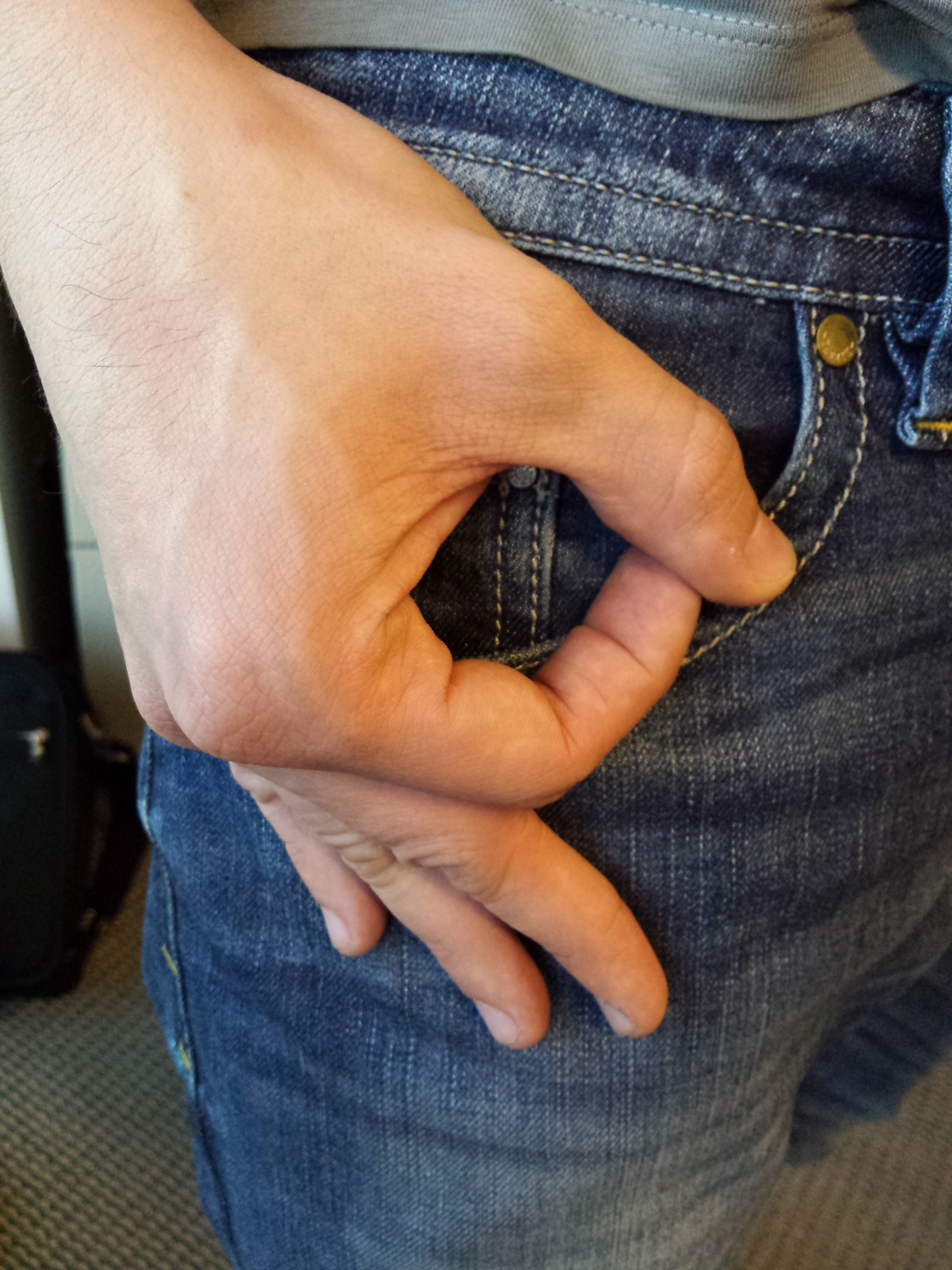 Una classica strategia del Gioco del Tondo: "la mano dalla tasca".